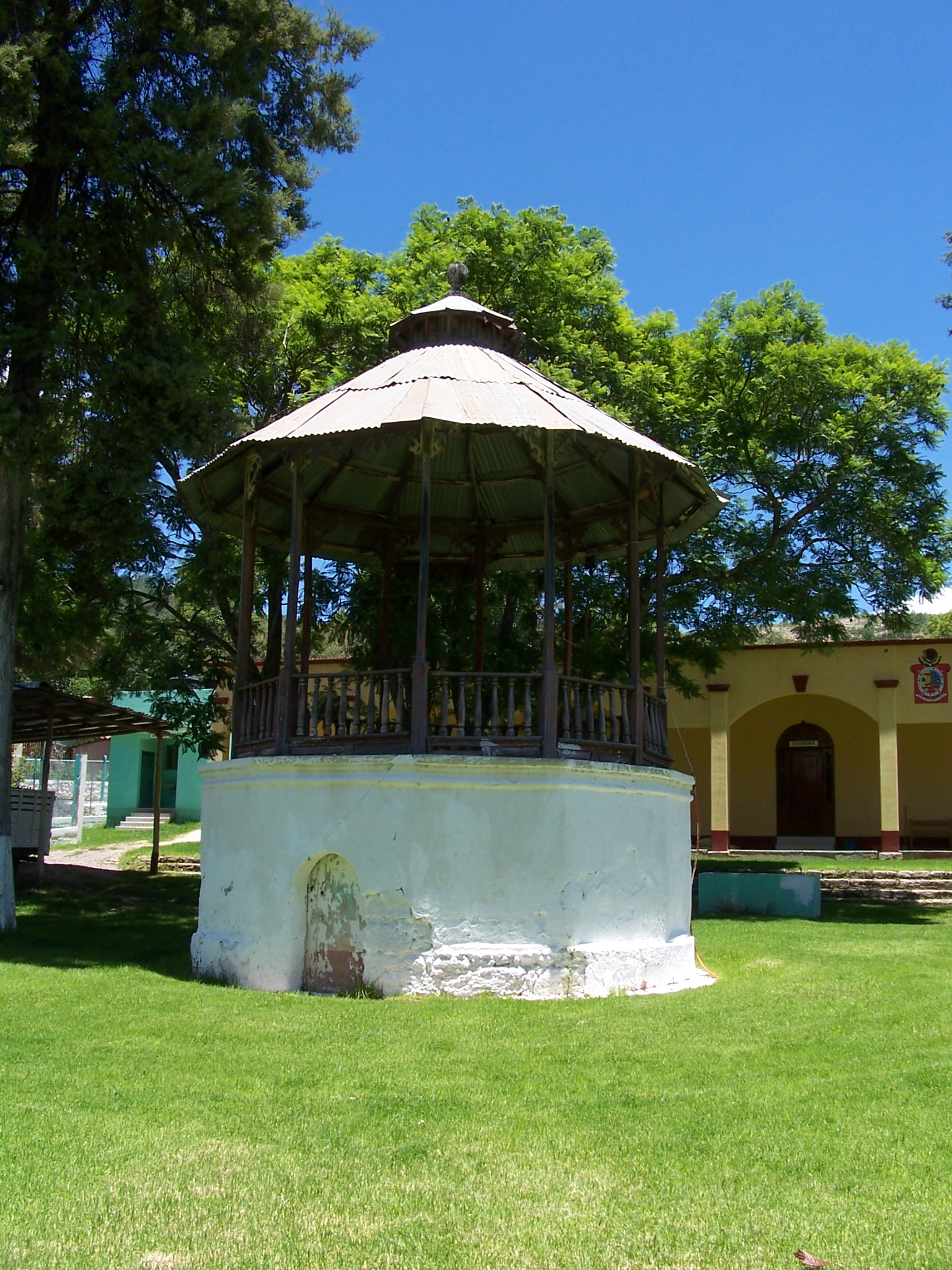 Kiosco de San Juan Achiutla, Oaxaca, México.